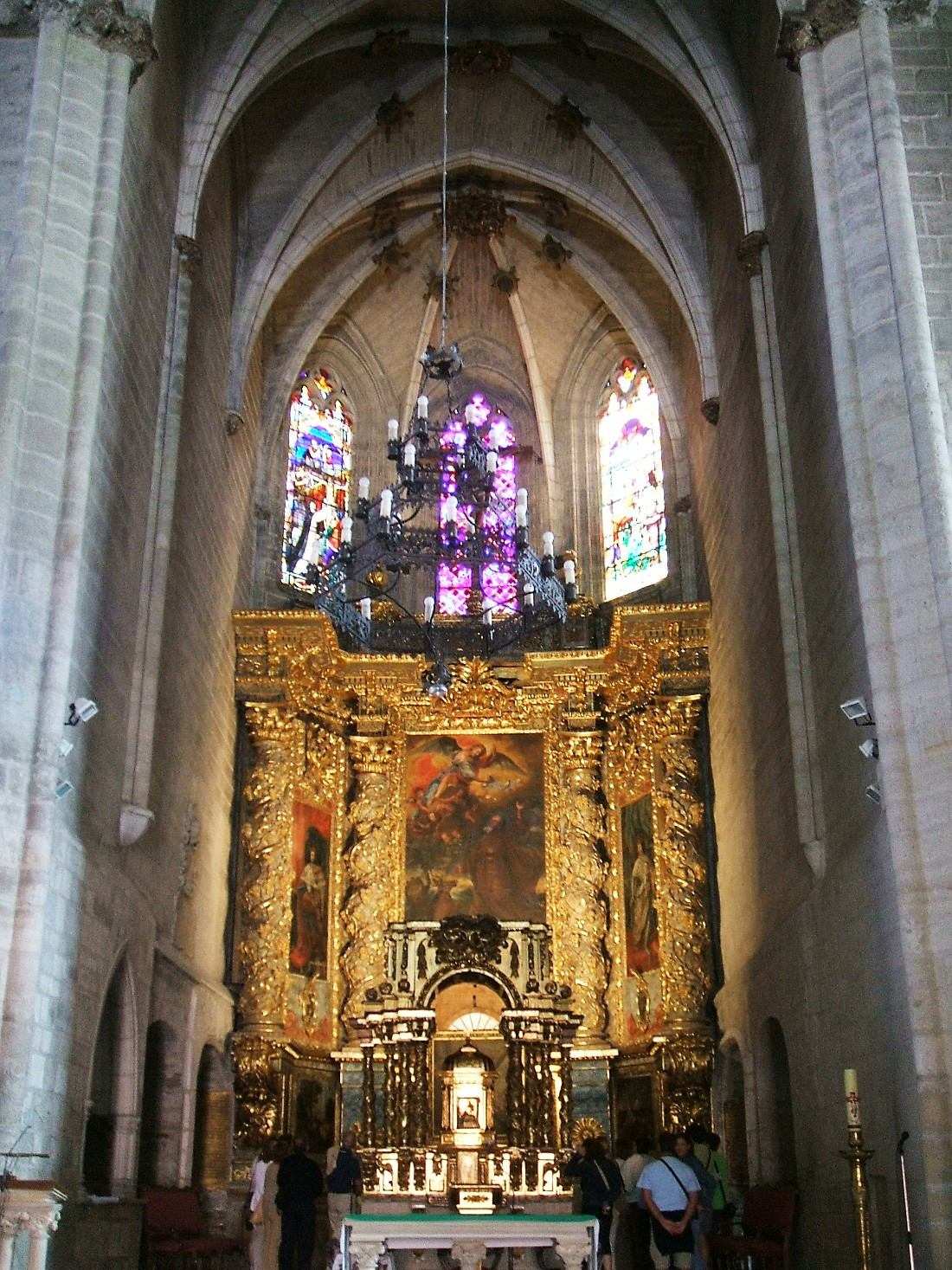 Retablo mayor de la Iglesia de San Gil Abad, Burgos